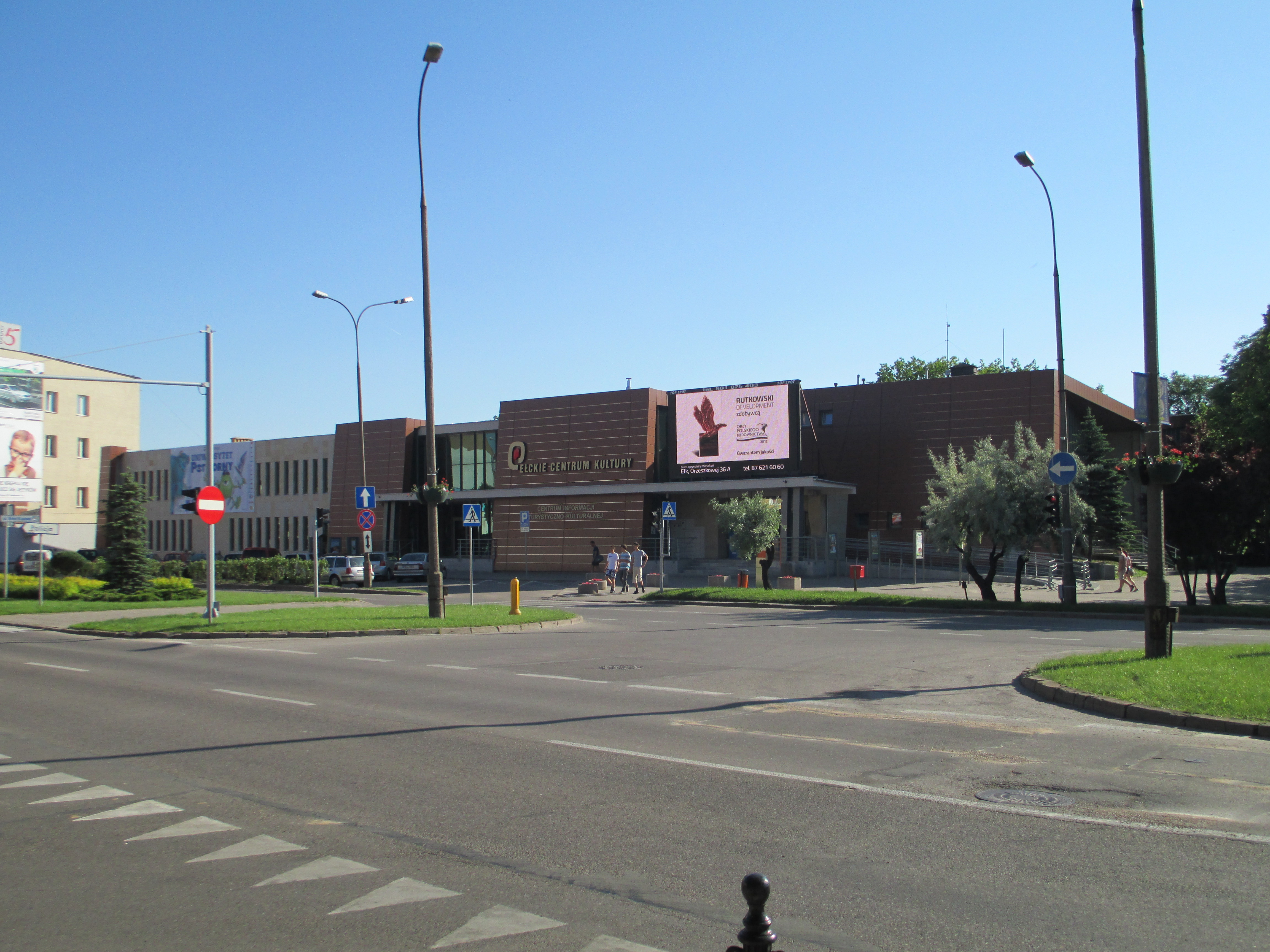 Ełk - Ełckie Centrum Kultury po modernizacji